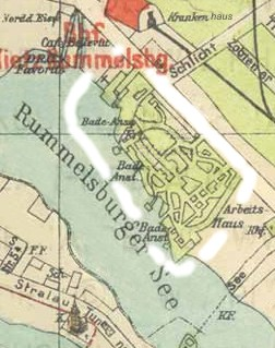 Rummelsburg, Lageplan Friedrichs-Waisenhaus um 1920